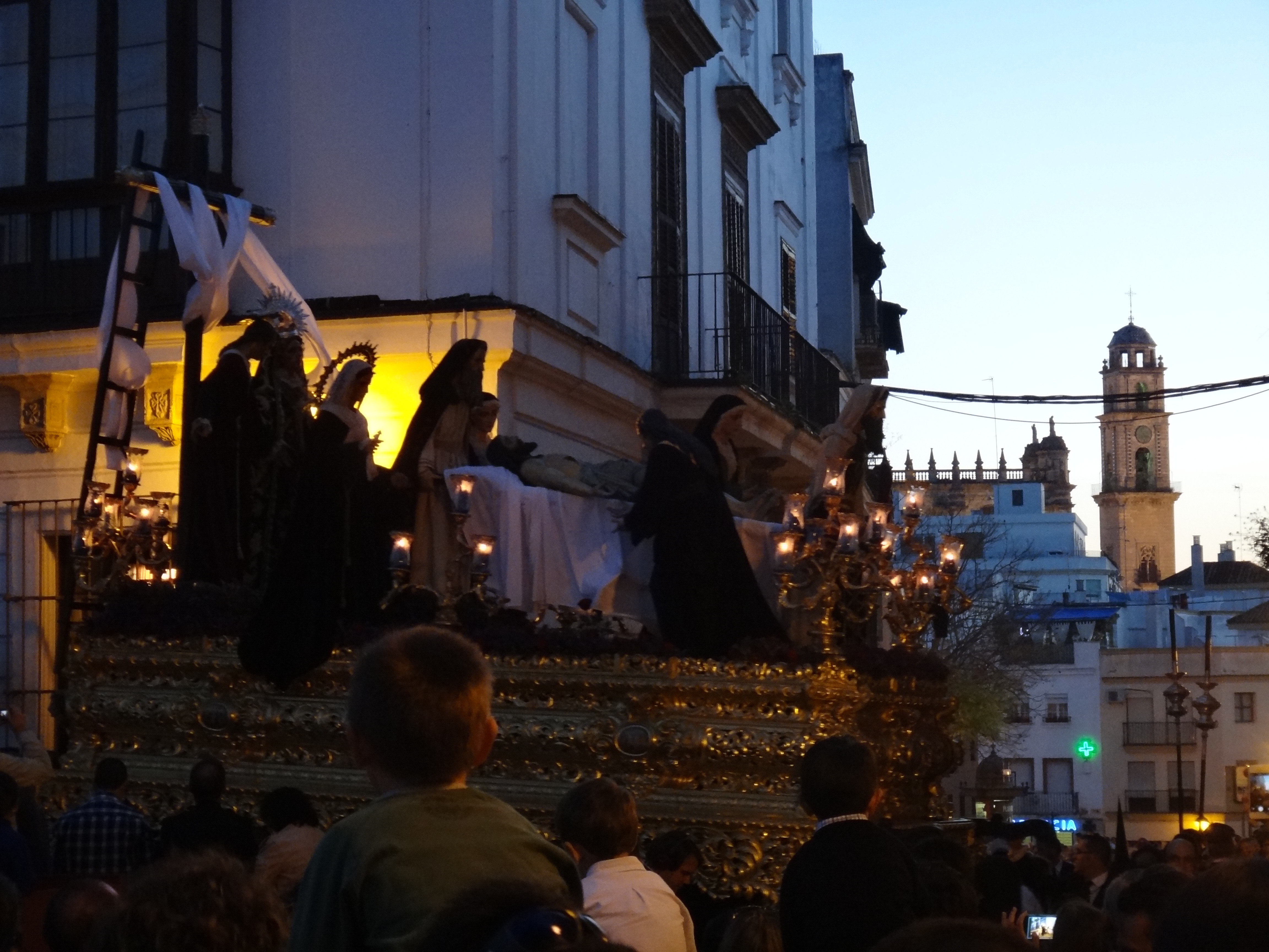 Santa Marta. Semana Santa de Jerez de la Frontera 2015 (Andalucía, España)